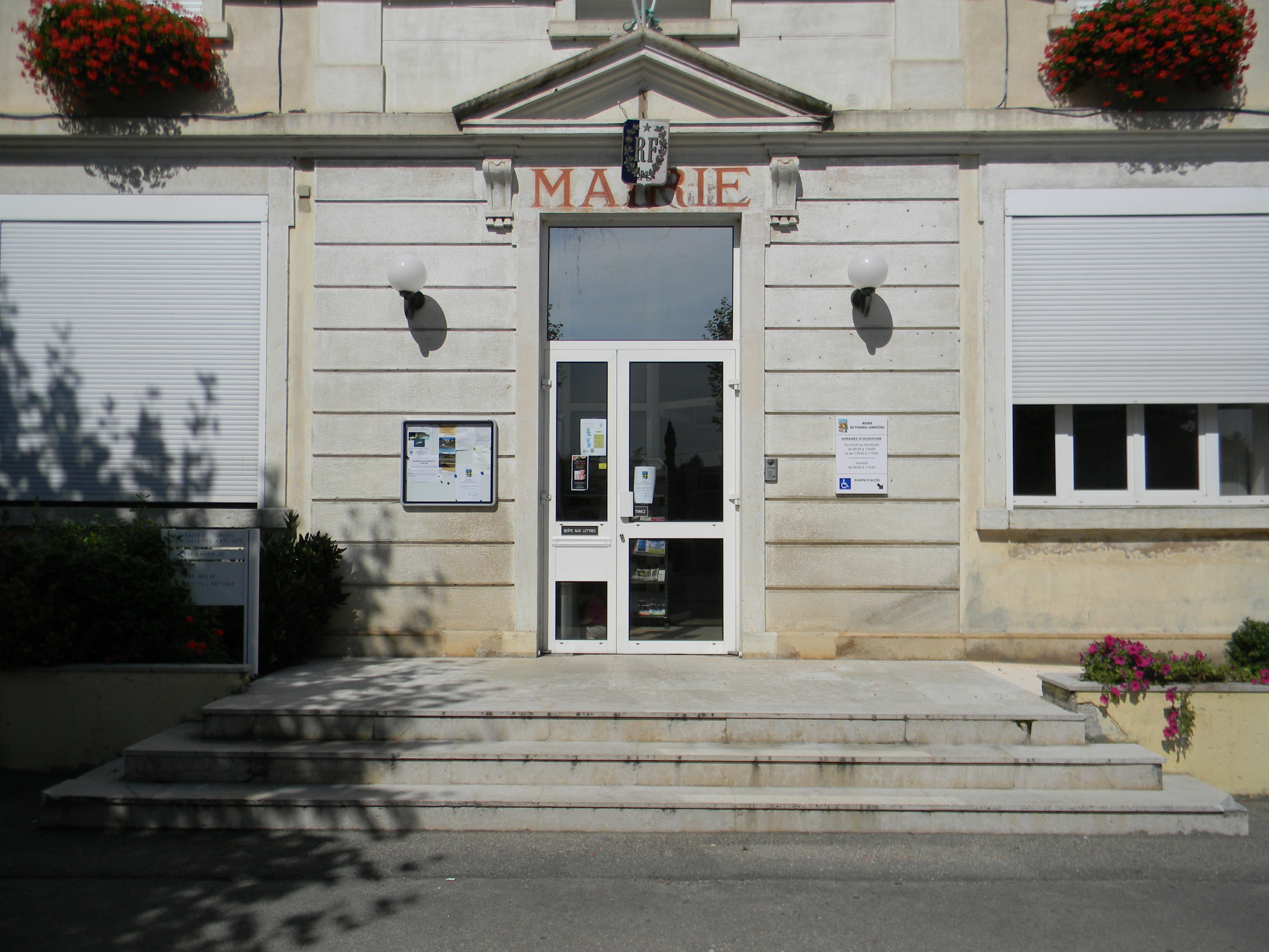 Mairie de Tignieu.